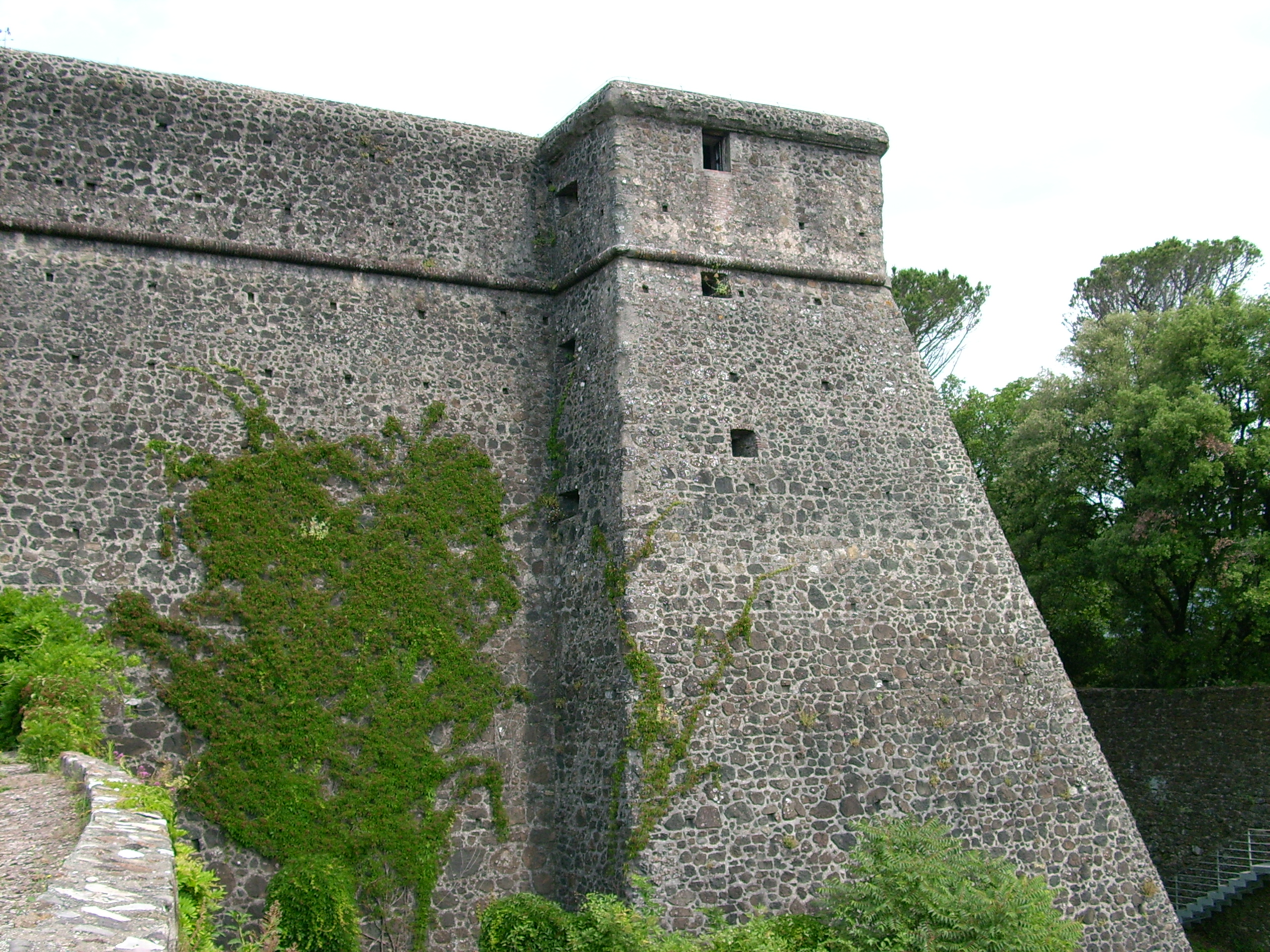 Fortezza della Brunella presso Aulla, Toscana, Italia